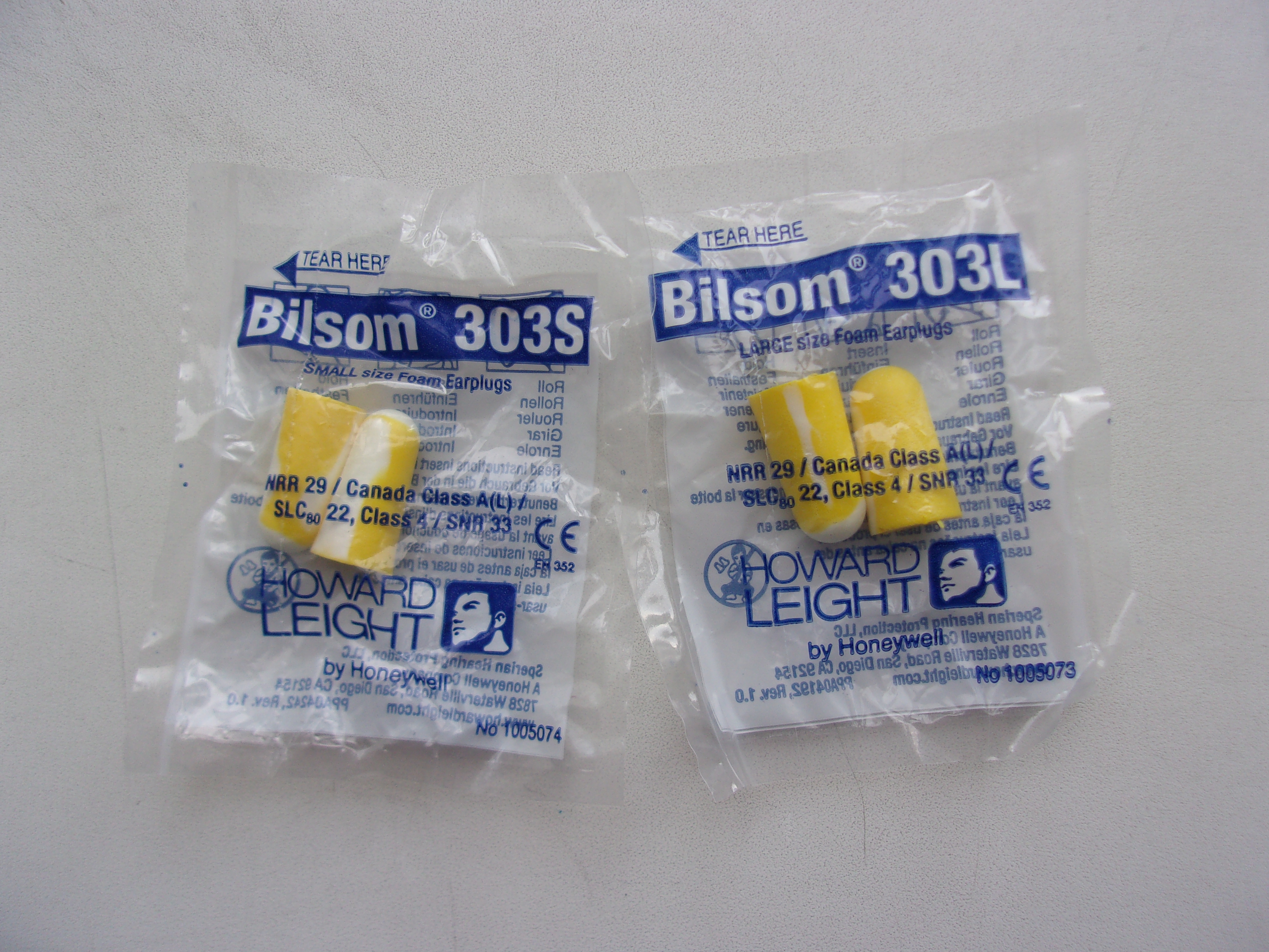 Средства индивидуальной защиты органа слуха от шума - вкладыши Bilsom 303. Особенность этих вкладышей в том, что в отличие от большинства других моделей, имеющихся в продаже в РФ, они изготавливаются в двух размерах - слева поменьше (Small), а справа побольше (Large). Это позволяет подобрать боле подходящие под конкретный размер ушного канала, и избежать излишнего раздражения, заставляющего работников не использовать СИЗ в шумных местах (что негативно влияет на здоровье).